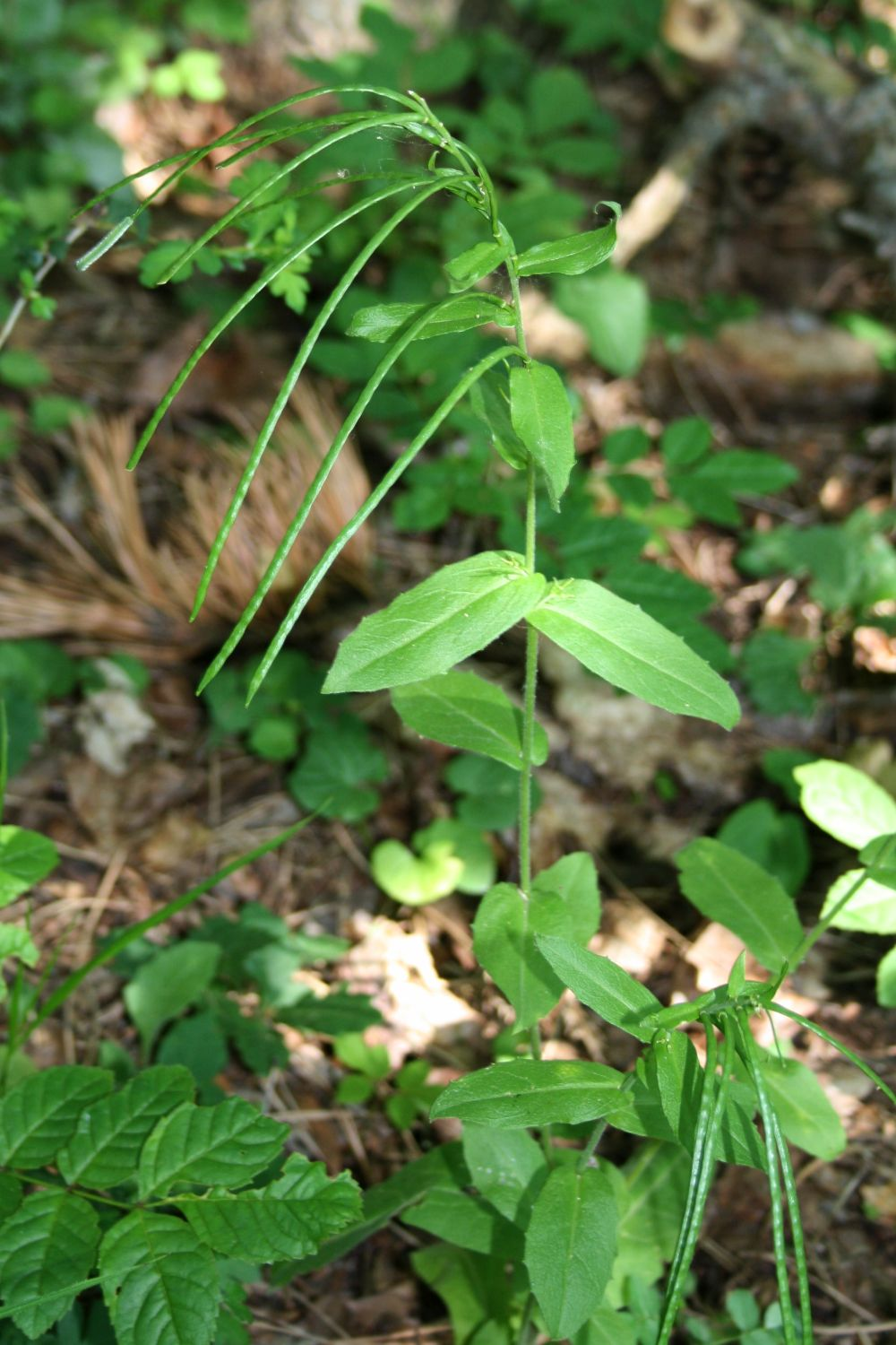 Bogen-Gänsekresse (Pseudoturritis turrita), Kreuzblütler (Brassicaceae) – Österreich/Austria/Autriche: Niederösterreich, Alpenostrand, Südostfuß des Pfaffstättner Kogels NW Pfaffstätten